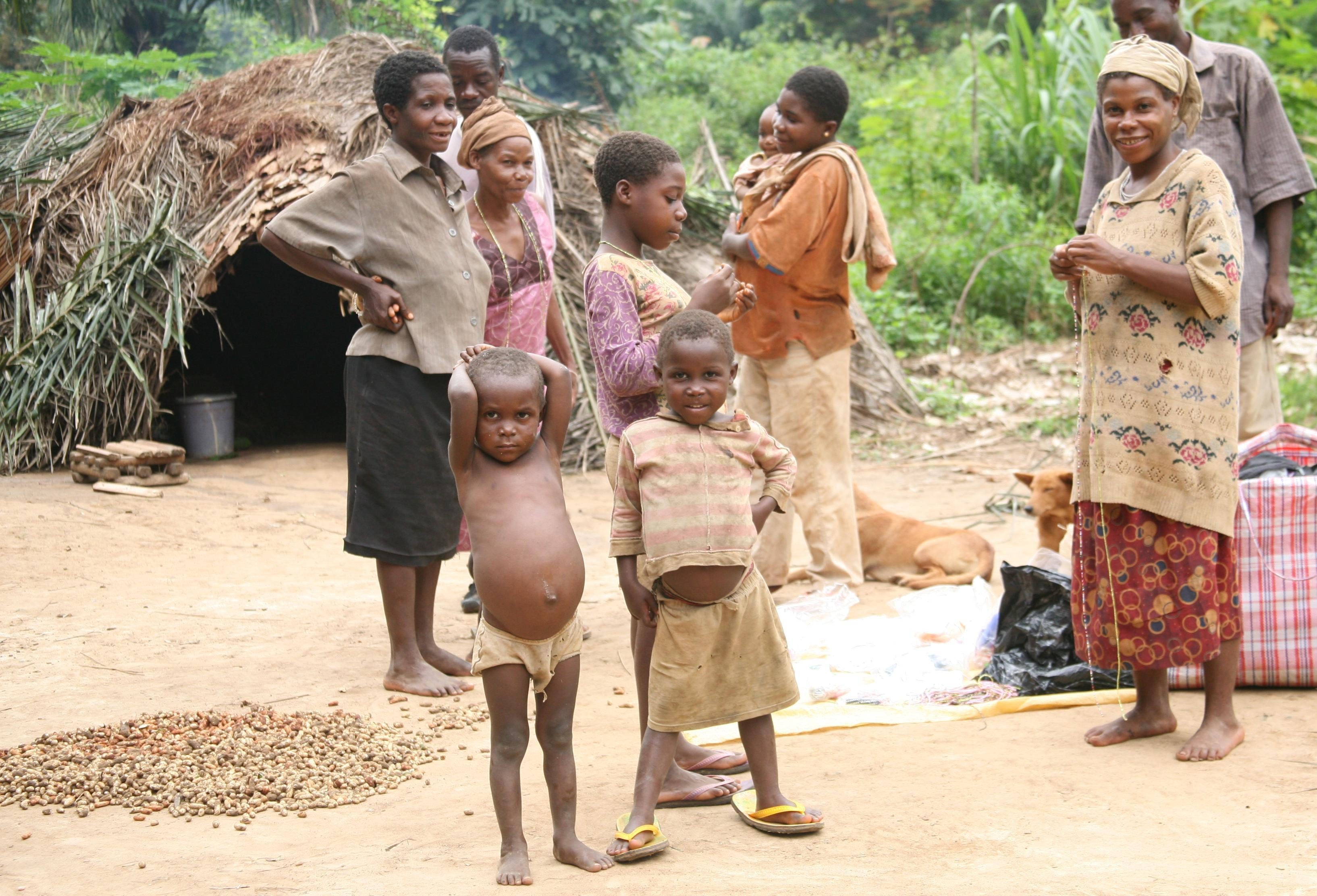 Pigmeos Baka en la Reserva Dja de Camerún